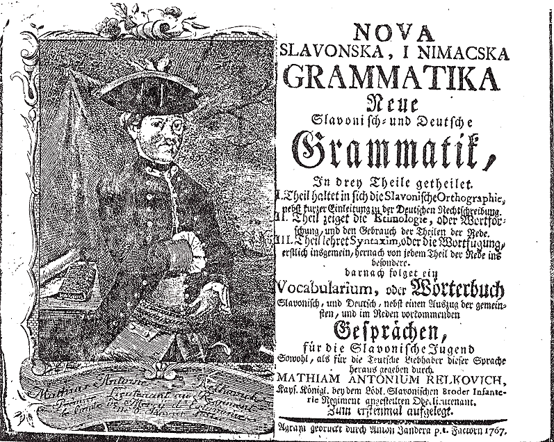 Matija Antun Relković,Nova slavonska i nimačka gramatika/Neue slavonisch und Deutsche Grammatik